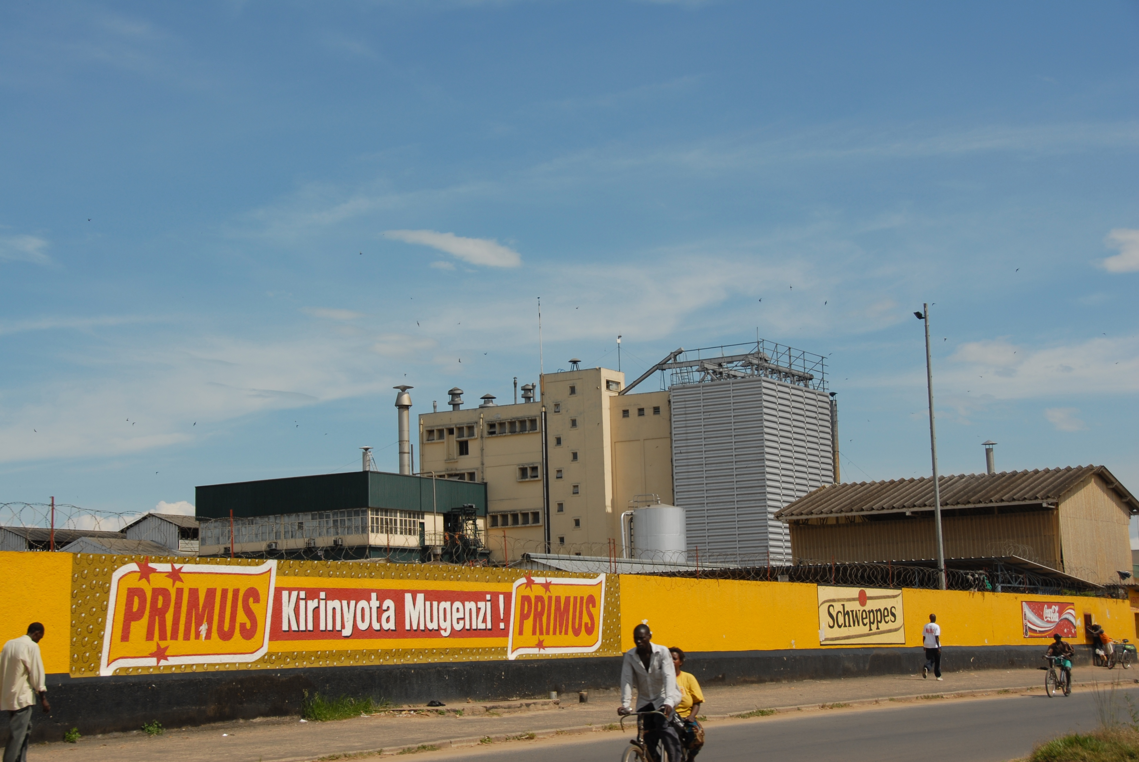 africa0703-0637a